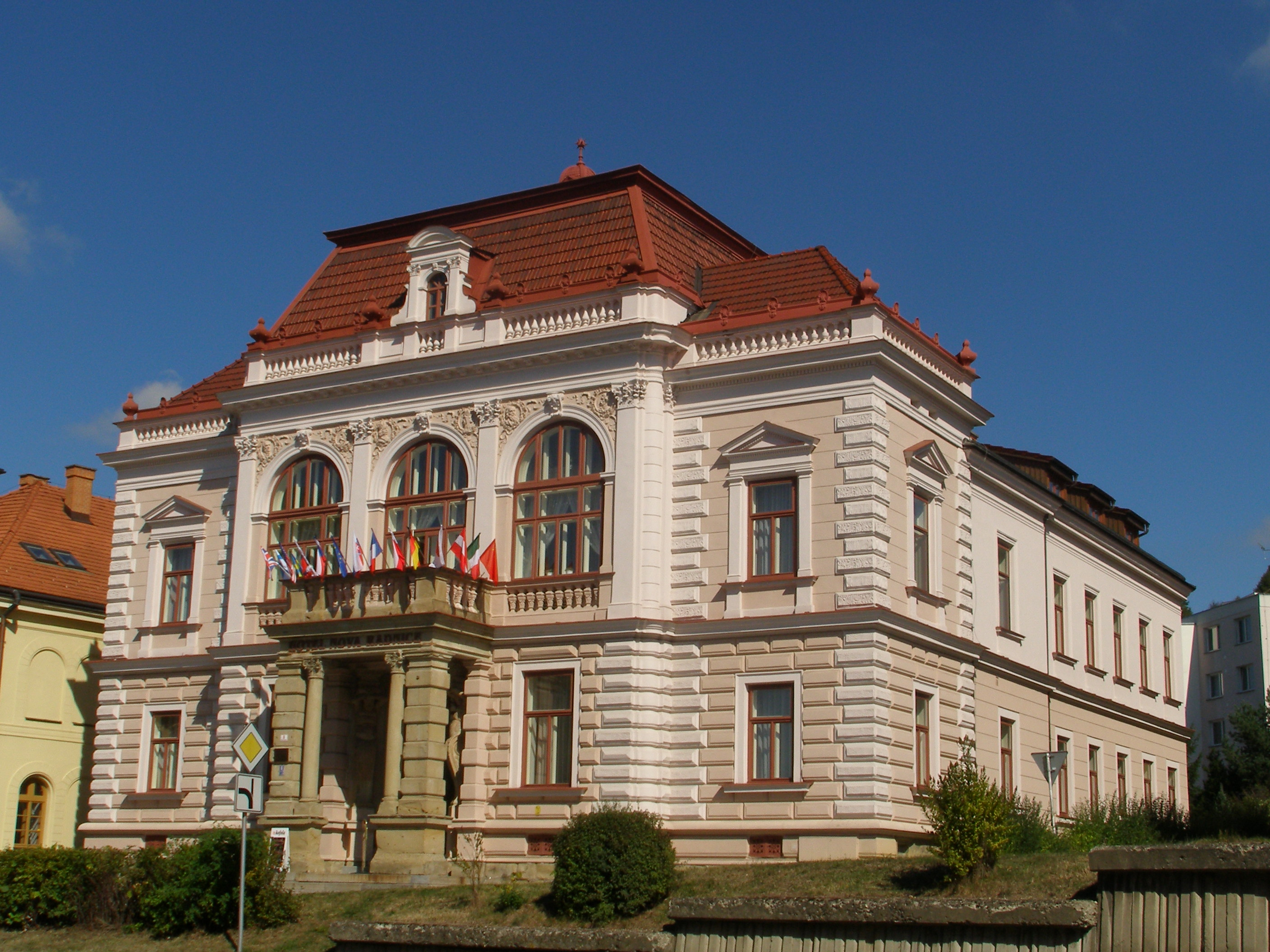 Radnice nová (Vsetín), nám. Horní 29, Vsetín